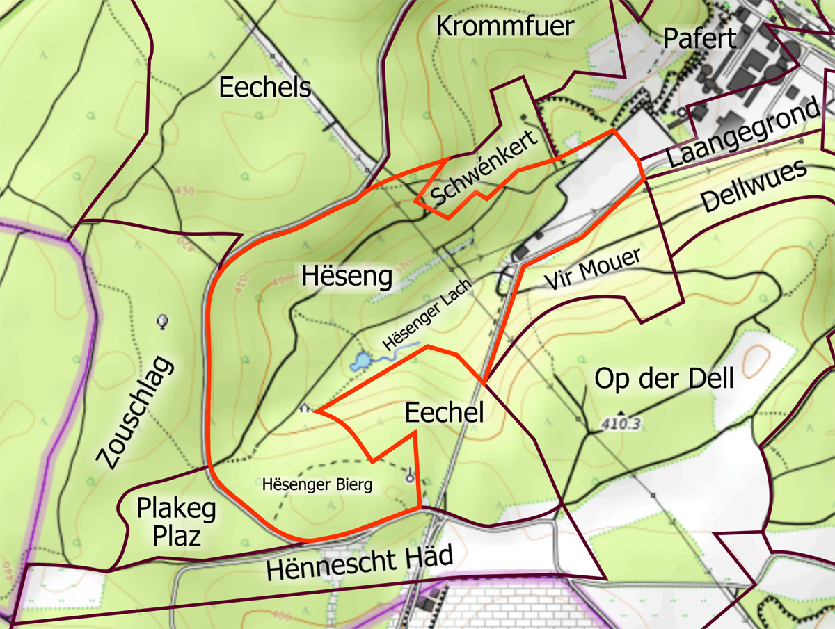 Koart vu Rëmeleng op deer de Flouer "Hëseng" ervirgehuewen ass.